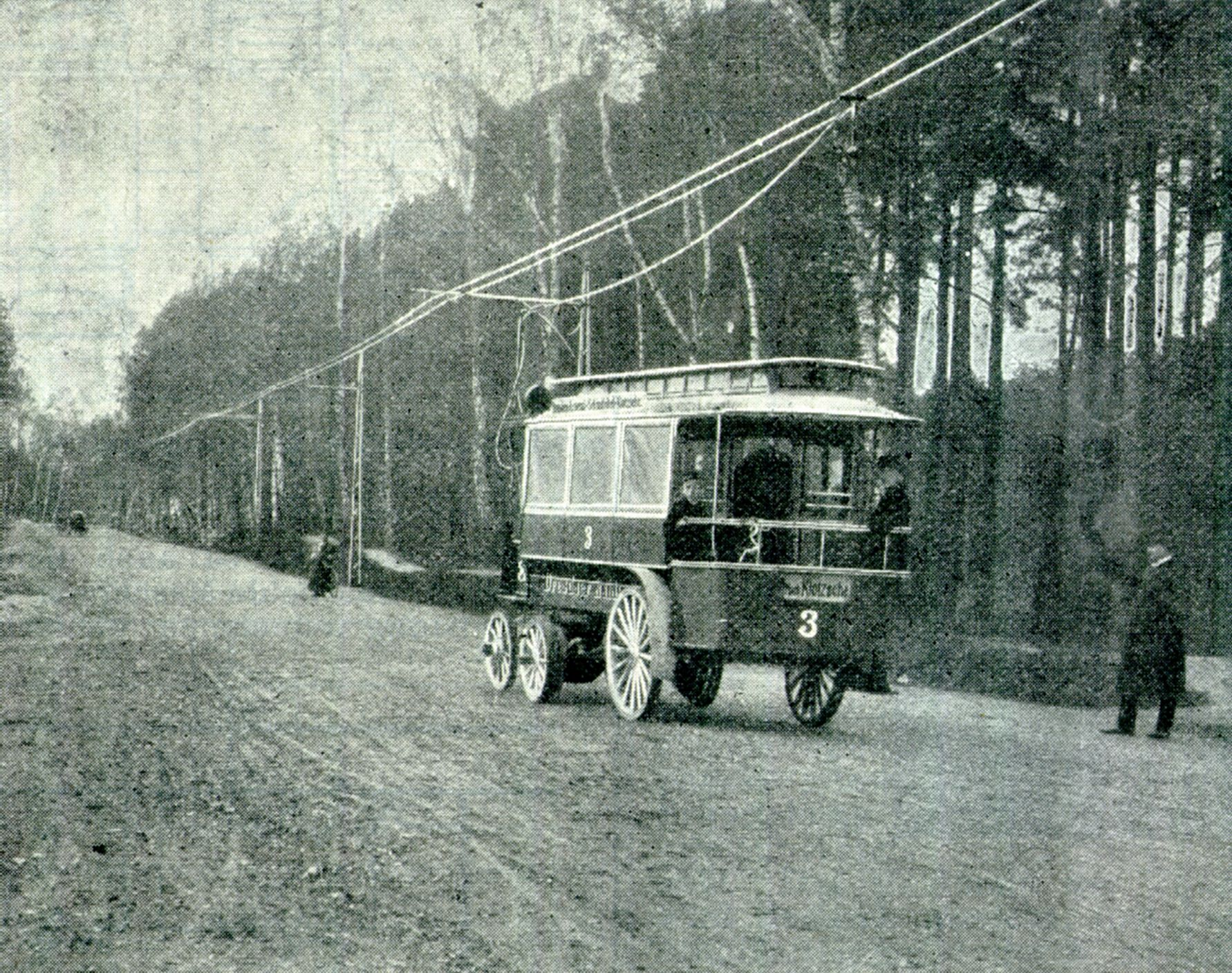 Fahrzeug und Strecke der Haidebahn in Dresden